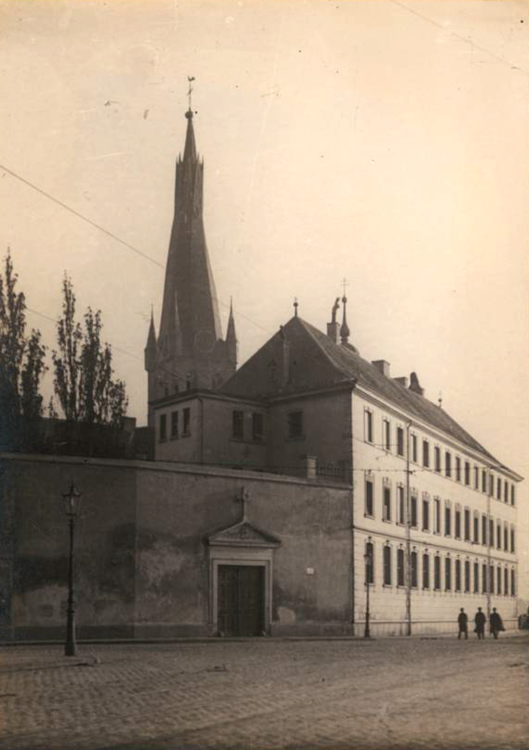 „Altes Carmelitessen-Kloster“, Einzelbilder vom Niederrhein (Nr. 1054), Erwin Quedenfeldt, 1915. Heute Rückseite der Altestadt 2 (ehemaliges Theresienhospital) an der Reuterkaserne. Im Hintergrund der Kirchturm von St. Lambertus